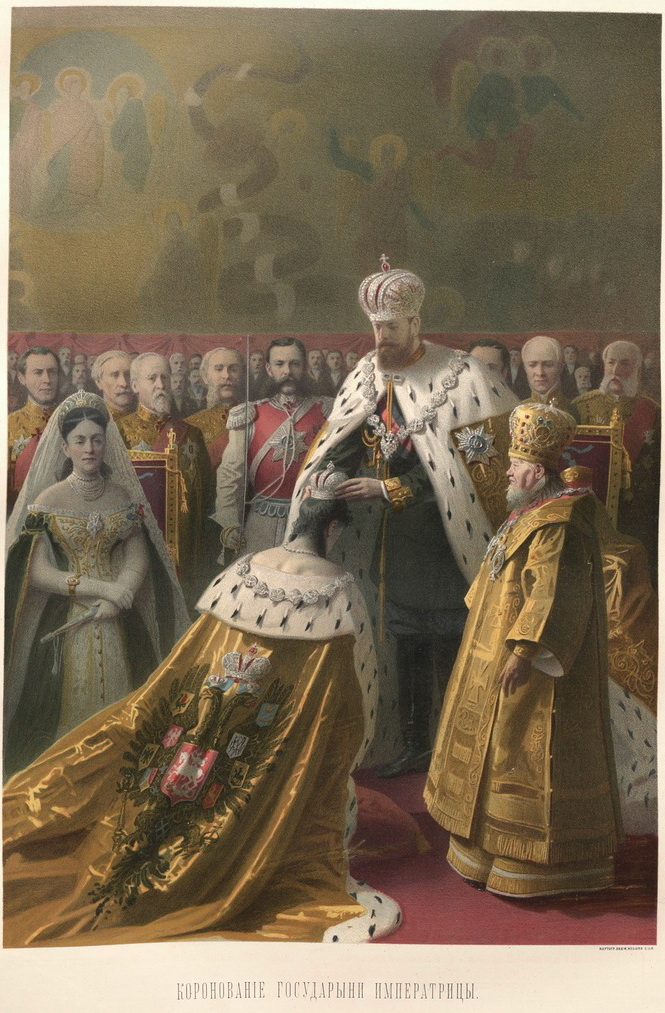 Описание священного коронования государя императора Александра III